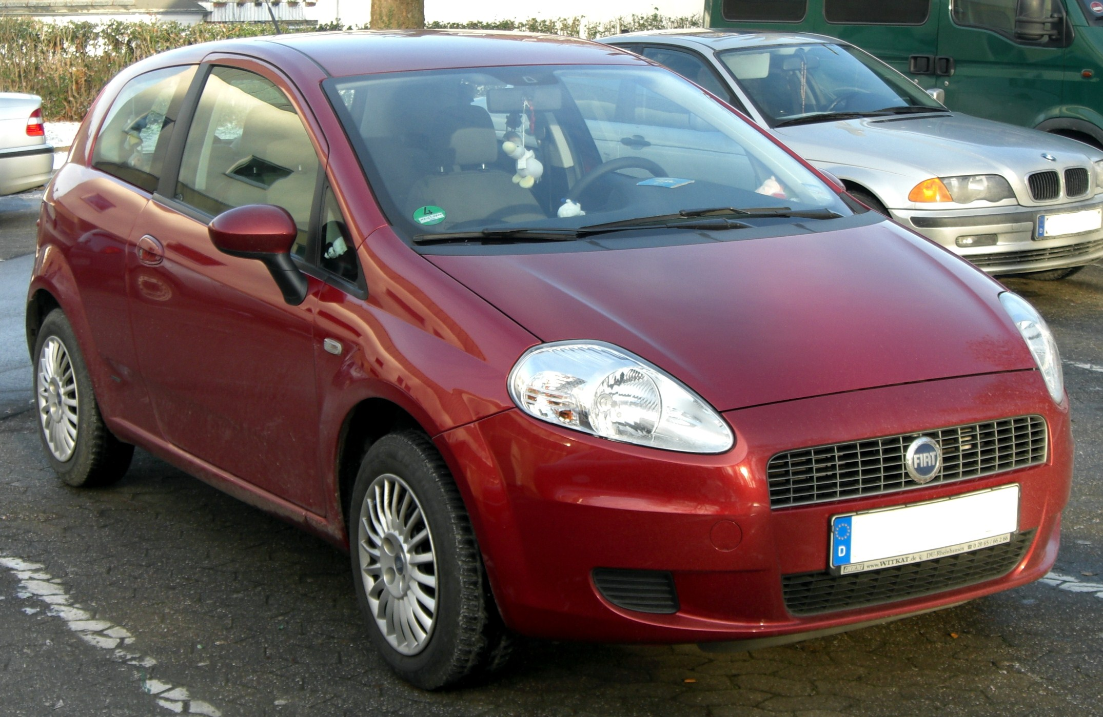 Fiat Grande Punto